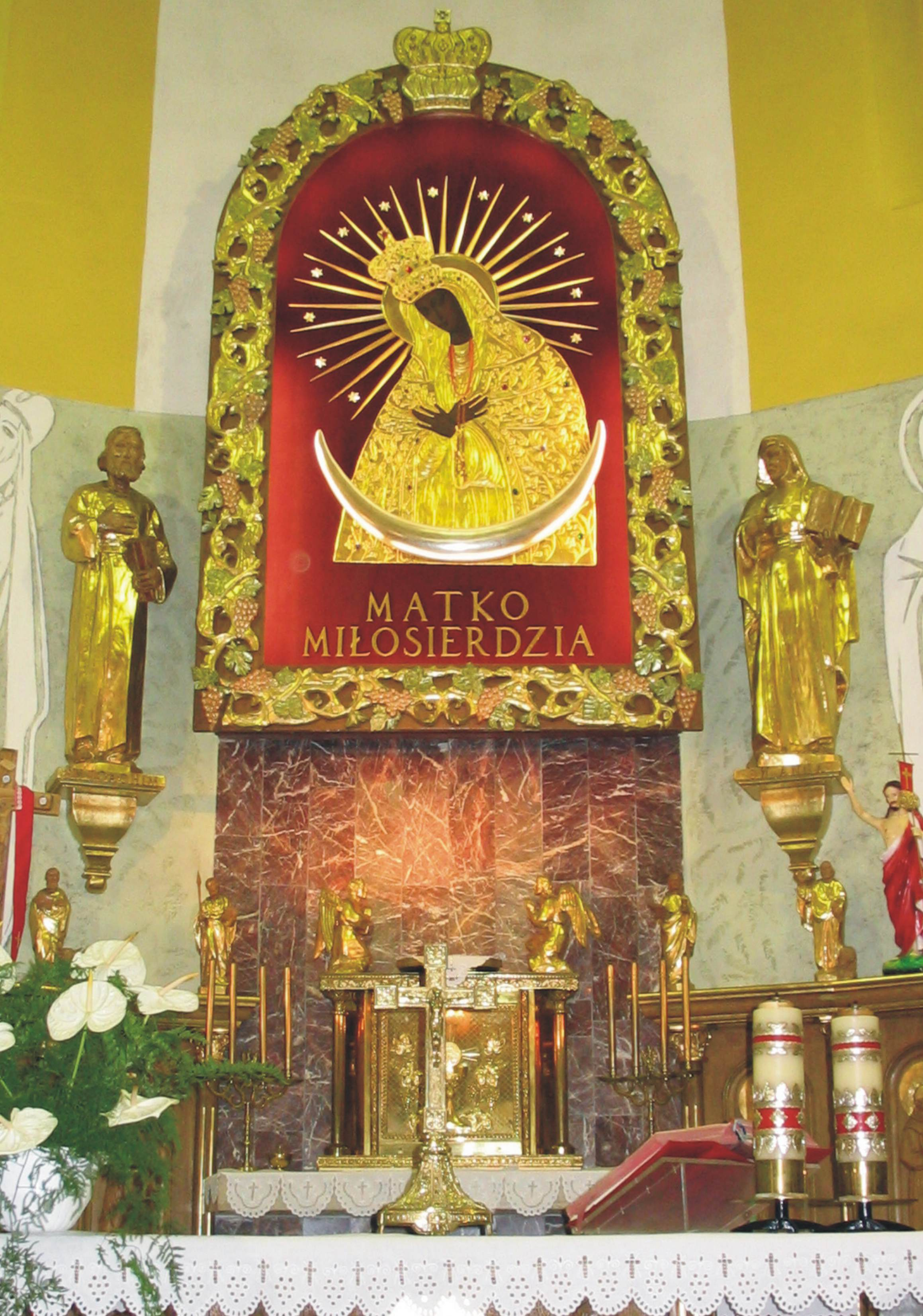 Ołtarz MB Ostrobramskiej w Kościele pw MB Ostrobramskiej w Chrzanowie